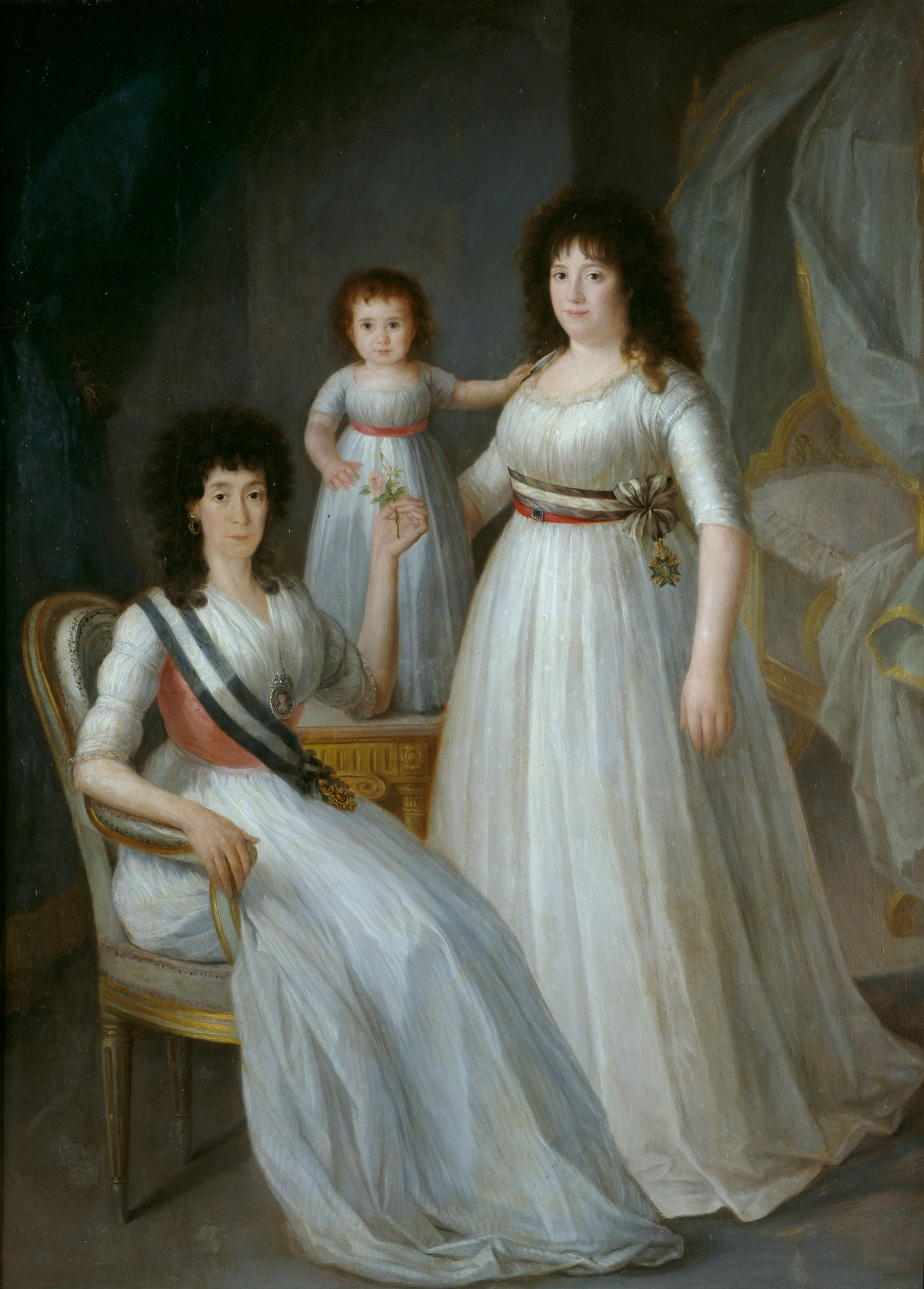 La Duquesa de Osuna y una joven, como Damas de la Orden de las Damas Nobles de María-Luisa, acompañadas de una niña.